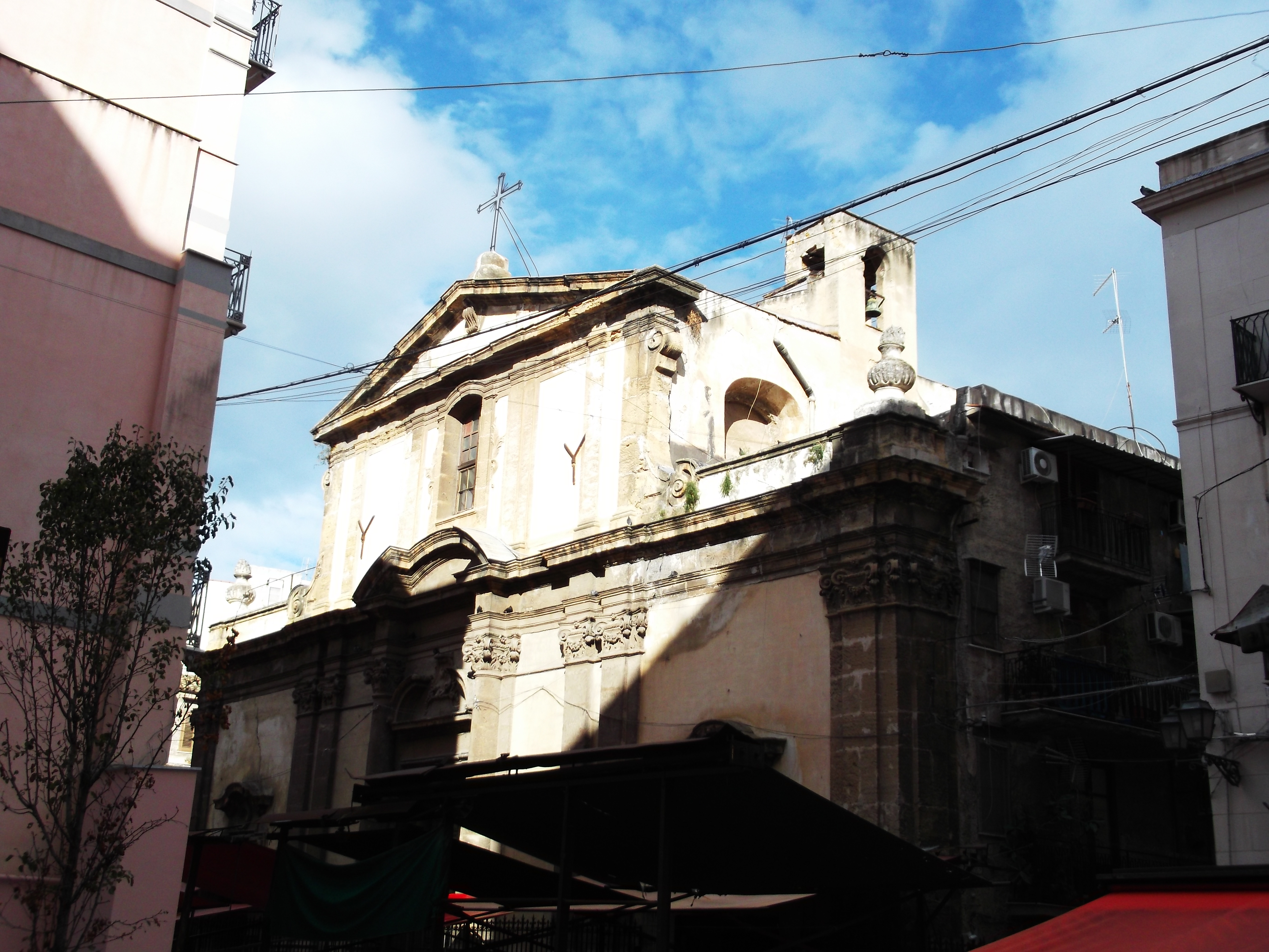 facciata